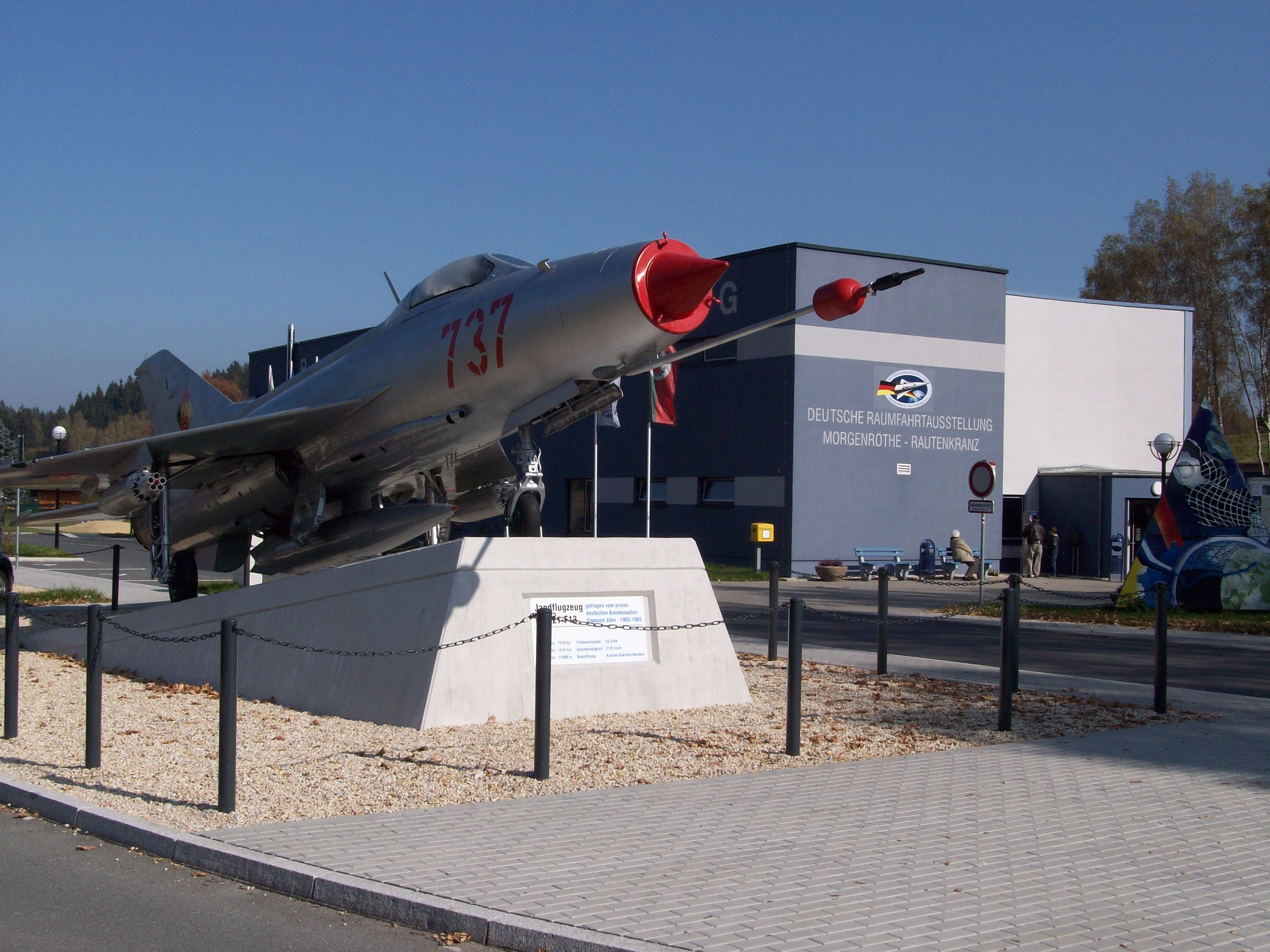 Eingang zur Deutschen Raumfahrtausstellung in Morgenröthe-Rautenkranz mit der MiG-21 F-13 des ersten deutschen Kosmonauten Sigmund Jähn